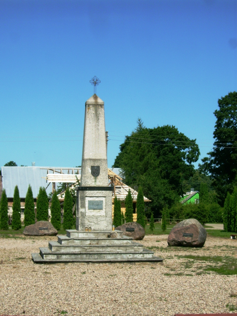 Obeliskas miestelio centre tremtiniams atminti.